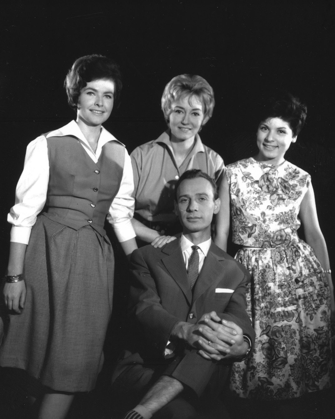 tévébemondók. Állnak Takács Marika, Lénárd Judit, Tamási Eszter és előttük ül Varga József .